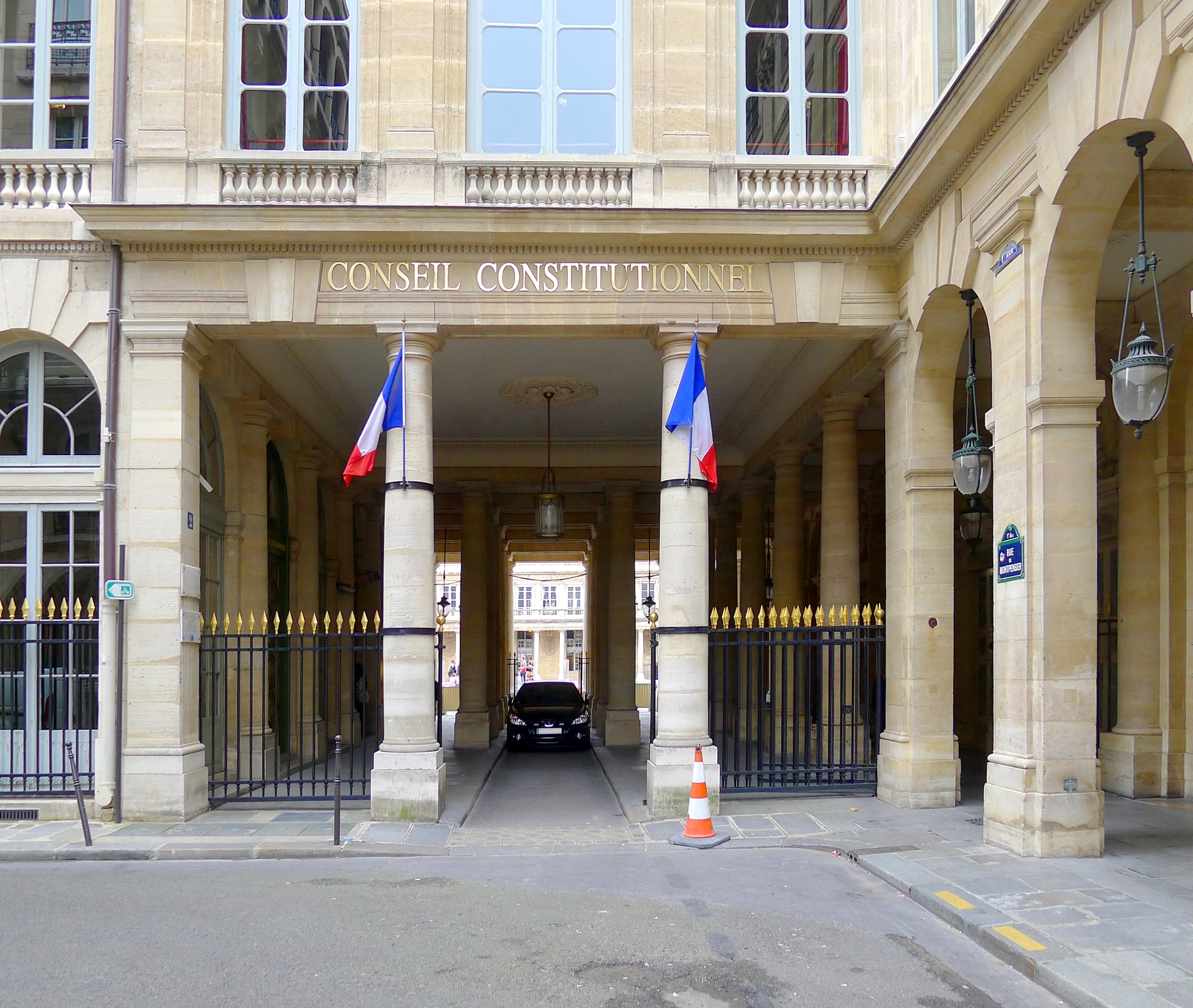 Rue de Montpensier (entrée du Conseil constitutionnel) - Paris Ier